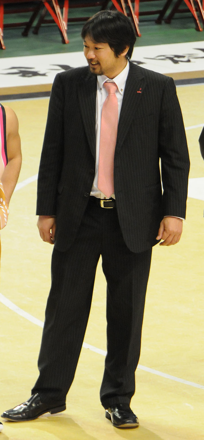 秋田ノーザンハピネッツ、大場清悦ゼネラルマネージャー。秋田市立体育館で。